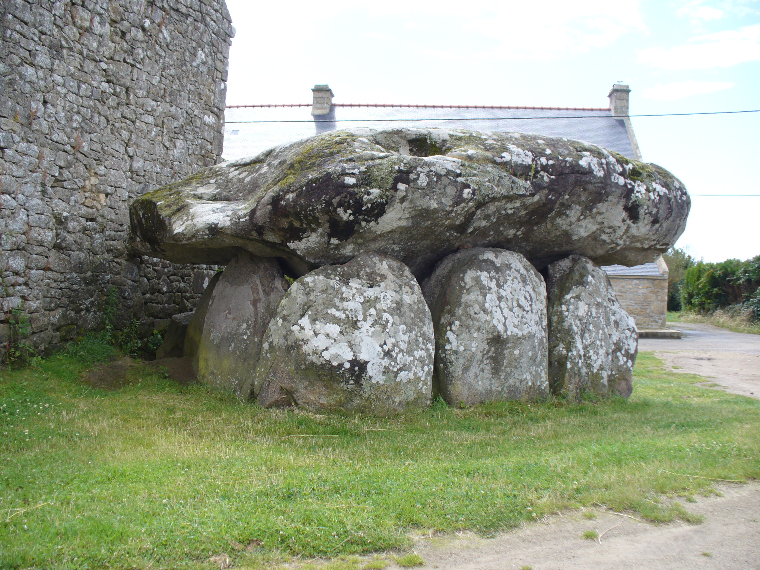 Dolmen (bretonisch Steintisch) Auf aufgerichteten Tragsteinen liegende grosse Steinplatten bezeichnet man als Dolmen -Megalithkultur der Jungsteinzeit(Neolithic) und Bronzezeit 4500 - 2300 v.Chr. - GangGrab von Crucuno - Departement Morbihan - Bretagne.